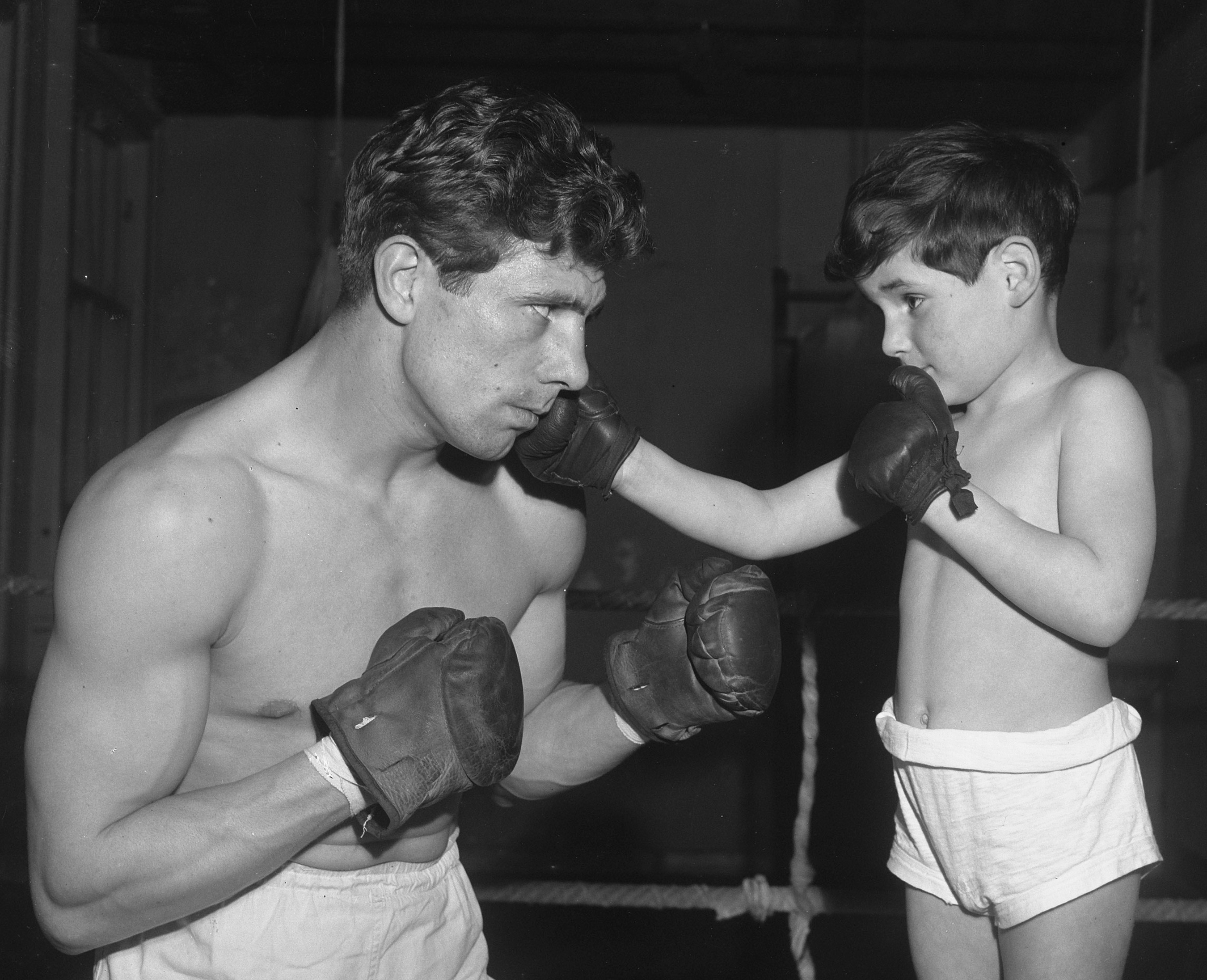 Training bokser Luc van Dam. Met zoontje